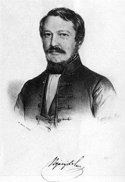 Barabás Miklós: Nyáry Pál portréja - litográfia